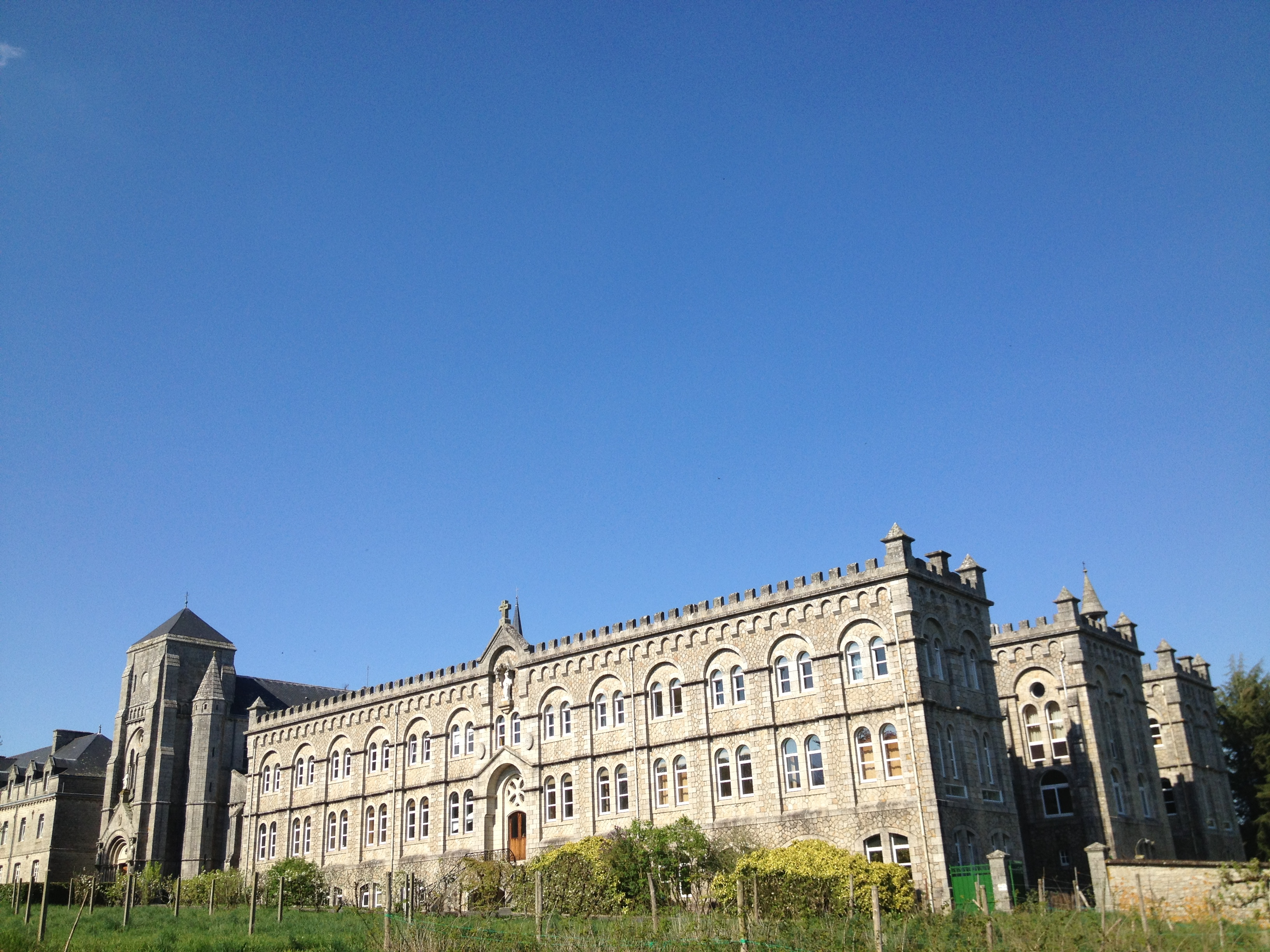 Monastère Notre Dame de Timadeuc